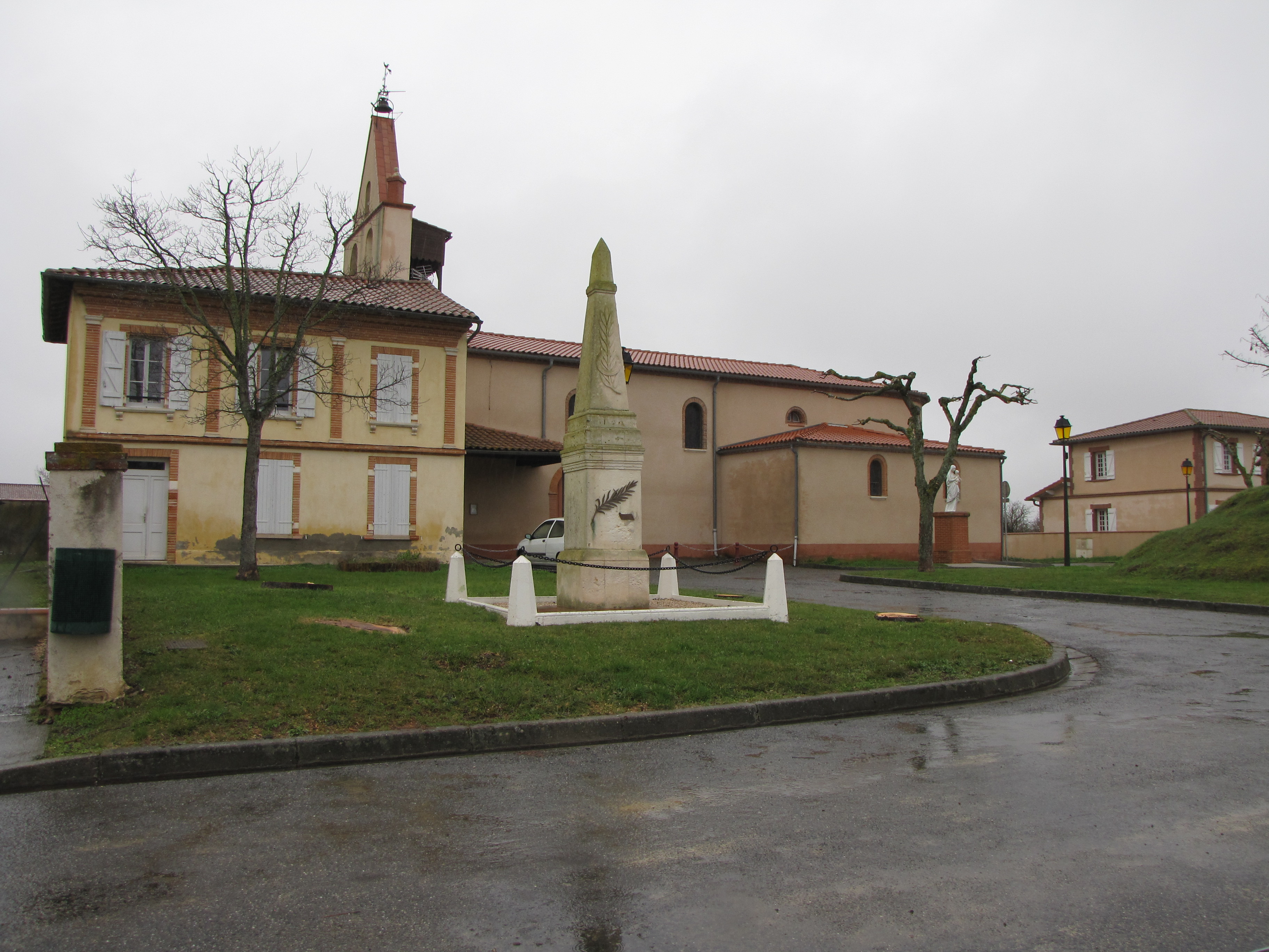 Cambernard